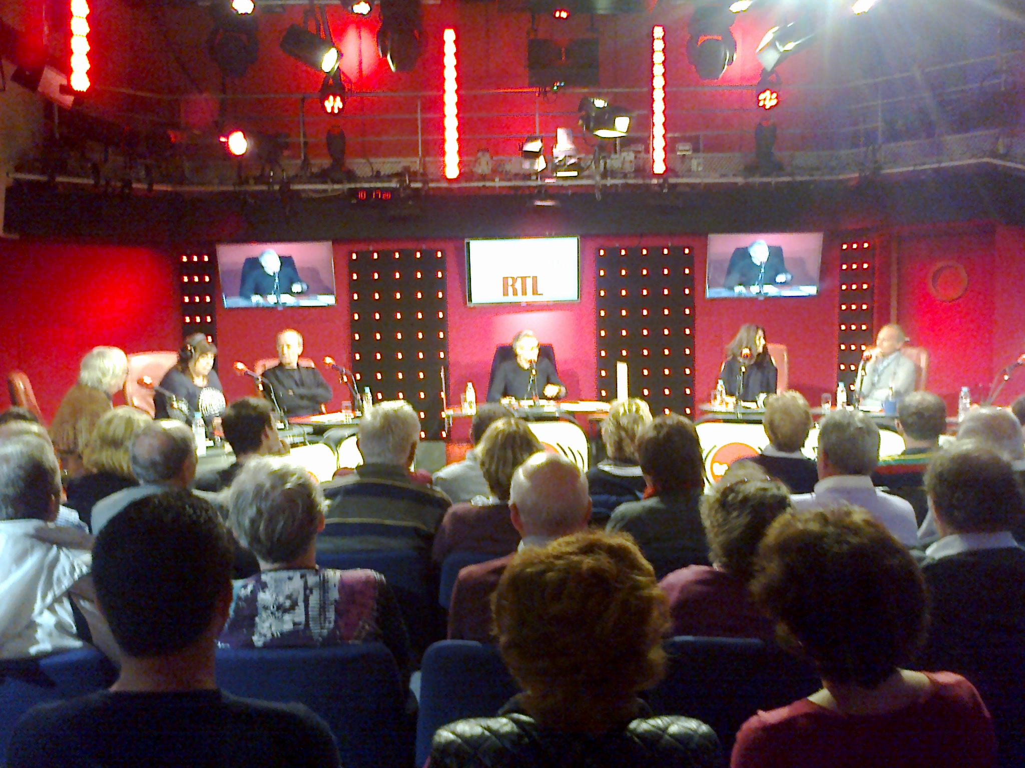 Enregistrement de l'émission de radio "Les grosses têtes" avec, de gauche à droite, Jean-Jacques Peroni, Michèle Bernier, Philippe Geluck, Laurent Ruquier, Cristiana Reali et Laurent Baffie.